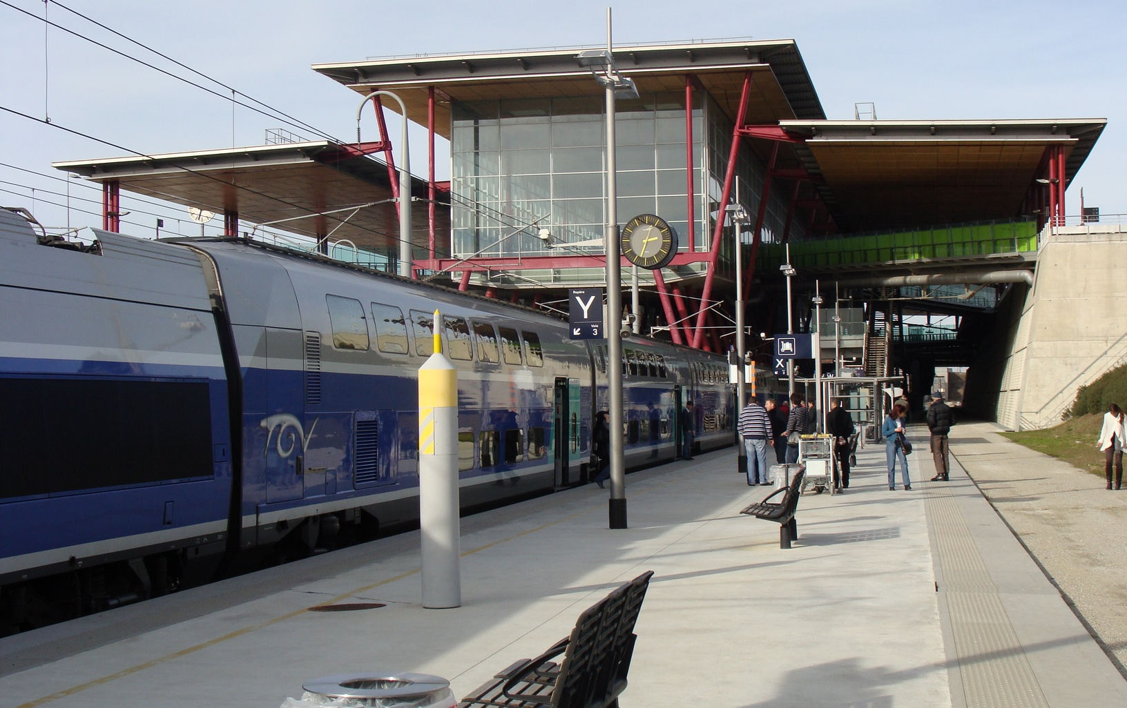 Un TGV destination Marseille en gare de Valence TGV ; on voit à droite l'emplacement réservé pour la future voie de raccordement avec la ligne de Grenoble.